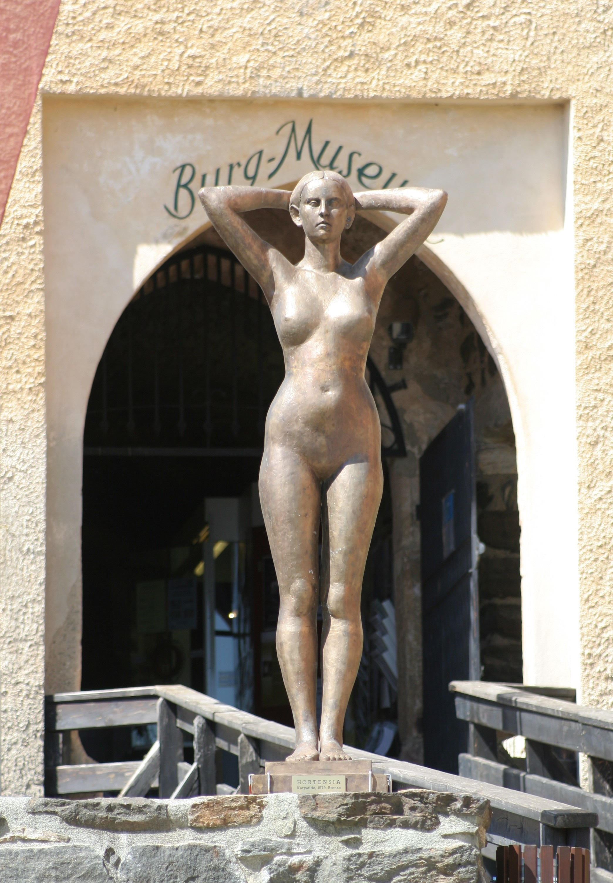 Hortensia: Karyatide, 1979, Bronze. Burg Deutschlandsberg, Weststeiermark, Österreich